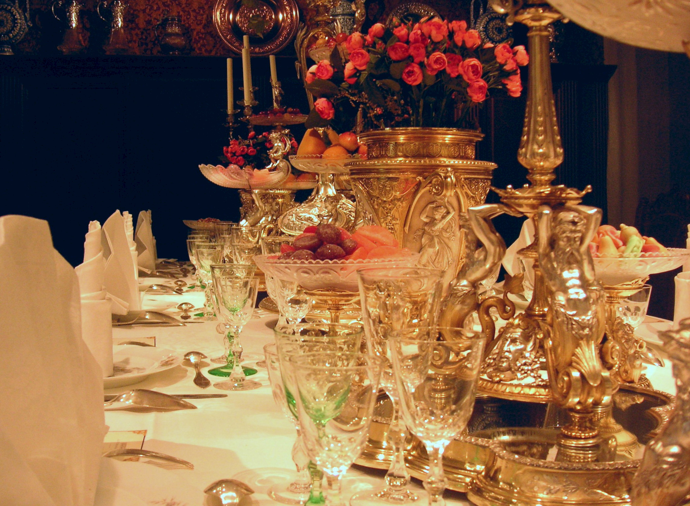 Nordiska museet dukade bord